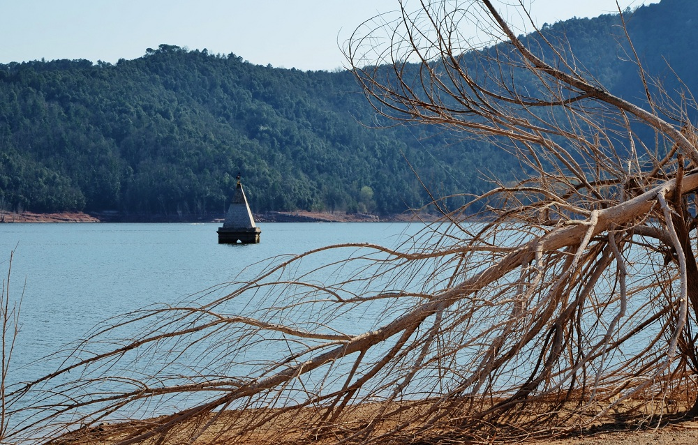 Església de Sant Romà de Sau (Vilanova de Sau)